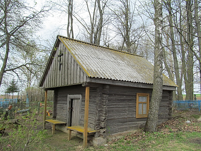 Горны Сноў. Капліца